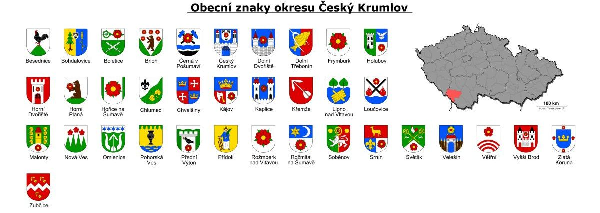 Přehled obecních znaků okresu Český Krumlov